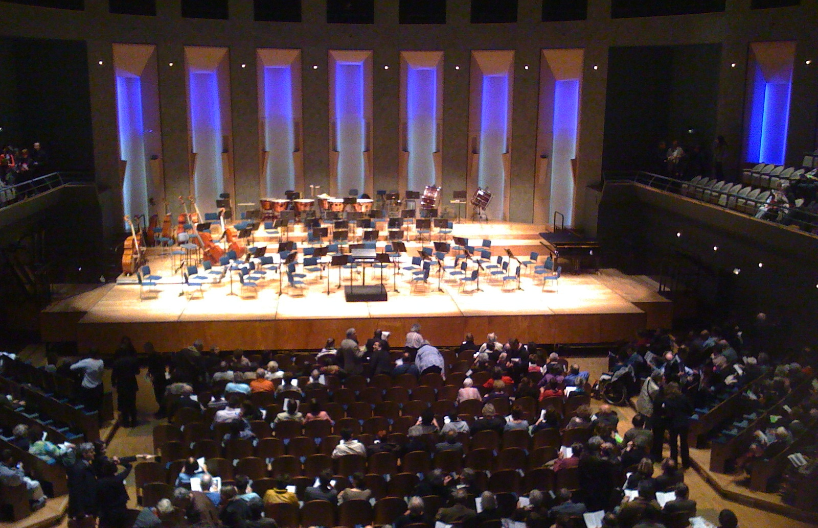 Cité de la musique, Paris. A remarquer : le nombre de contrebasses, nécessaires à l'exécution du chef d'oeuvre de Berlioz.